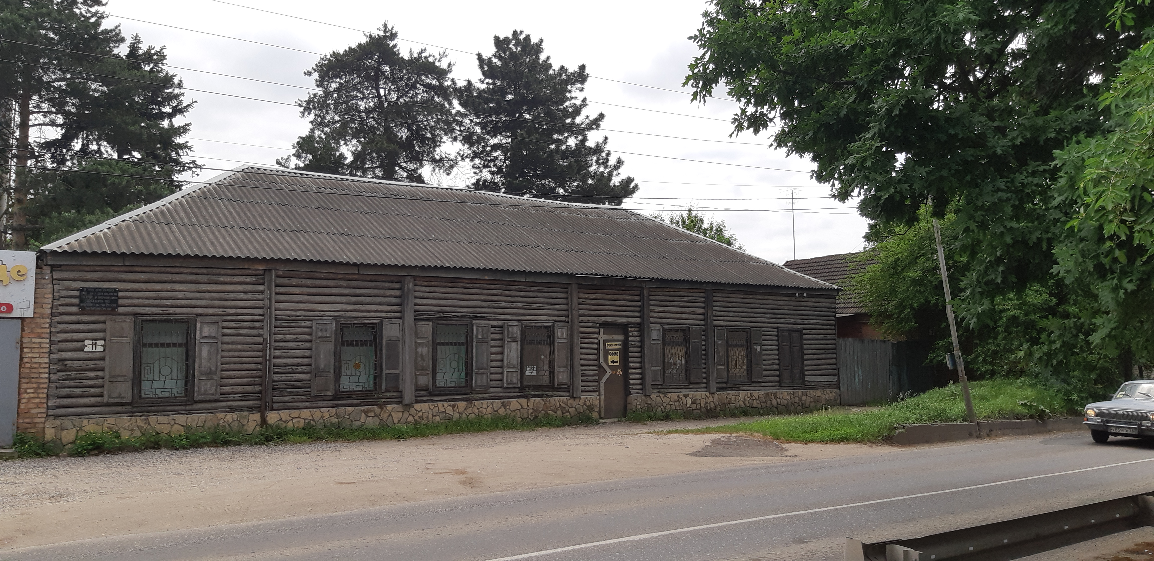 Дом наместника Кавказа, в ктором был подписан Георгиевский трактат 1783 года.